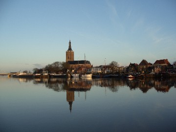 Stephanustsjerke yn Hasselt.